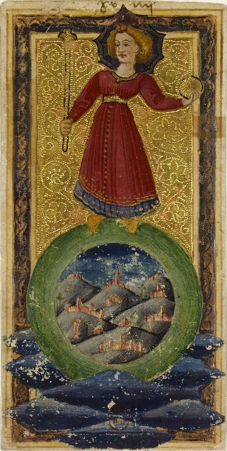 Charles VI (or Gringonneur) Deck; Le tarot dit de Charles VI